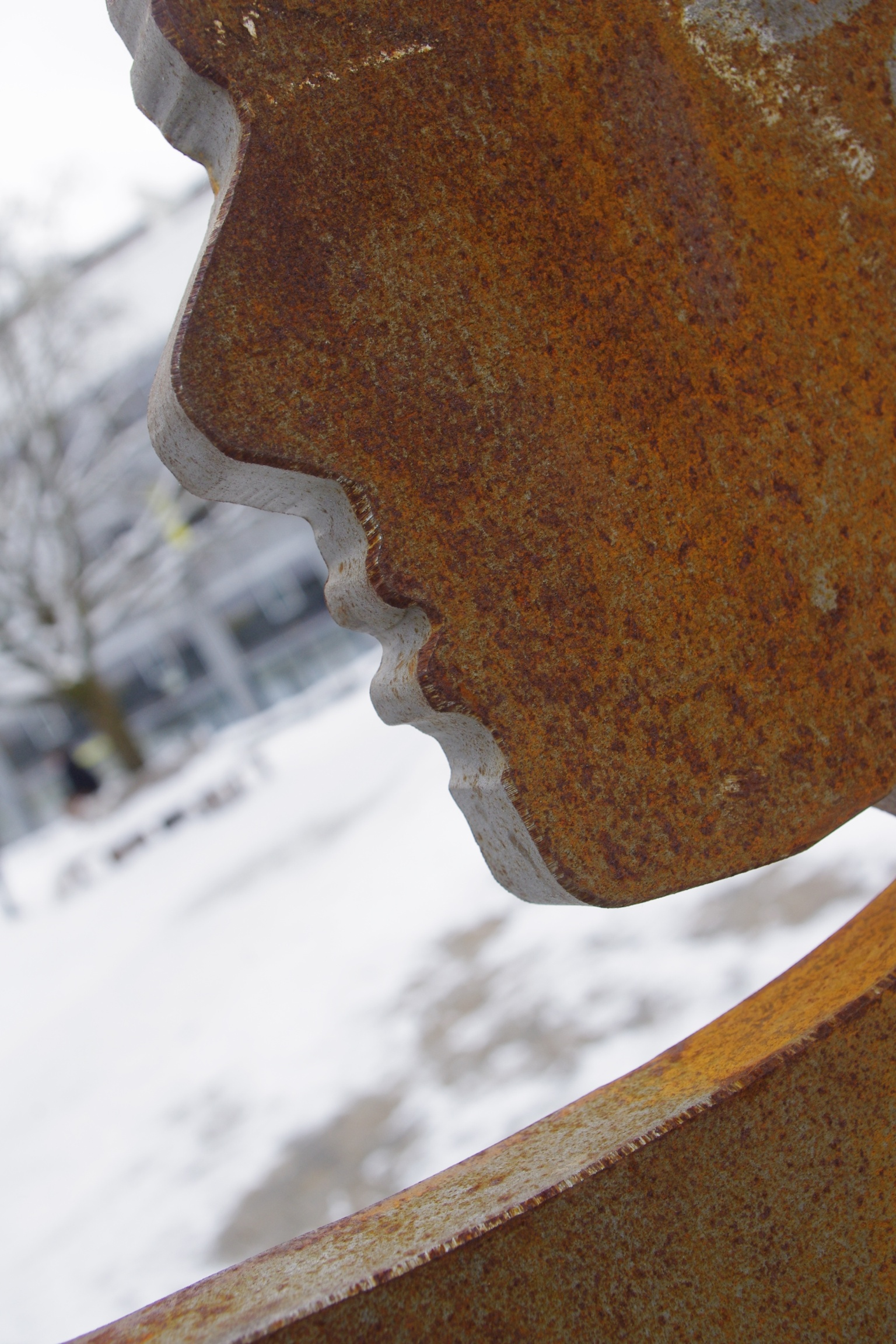 Mauer-Kunstwerk am Gymnasium Grafing im Januar 2013